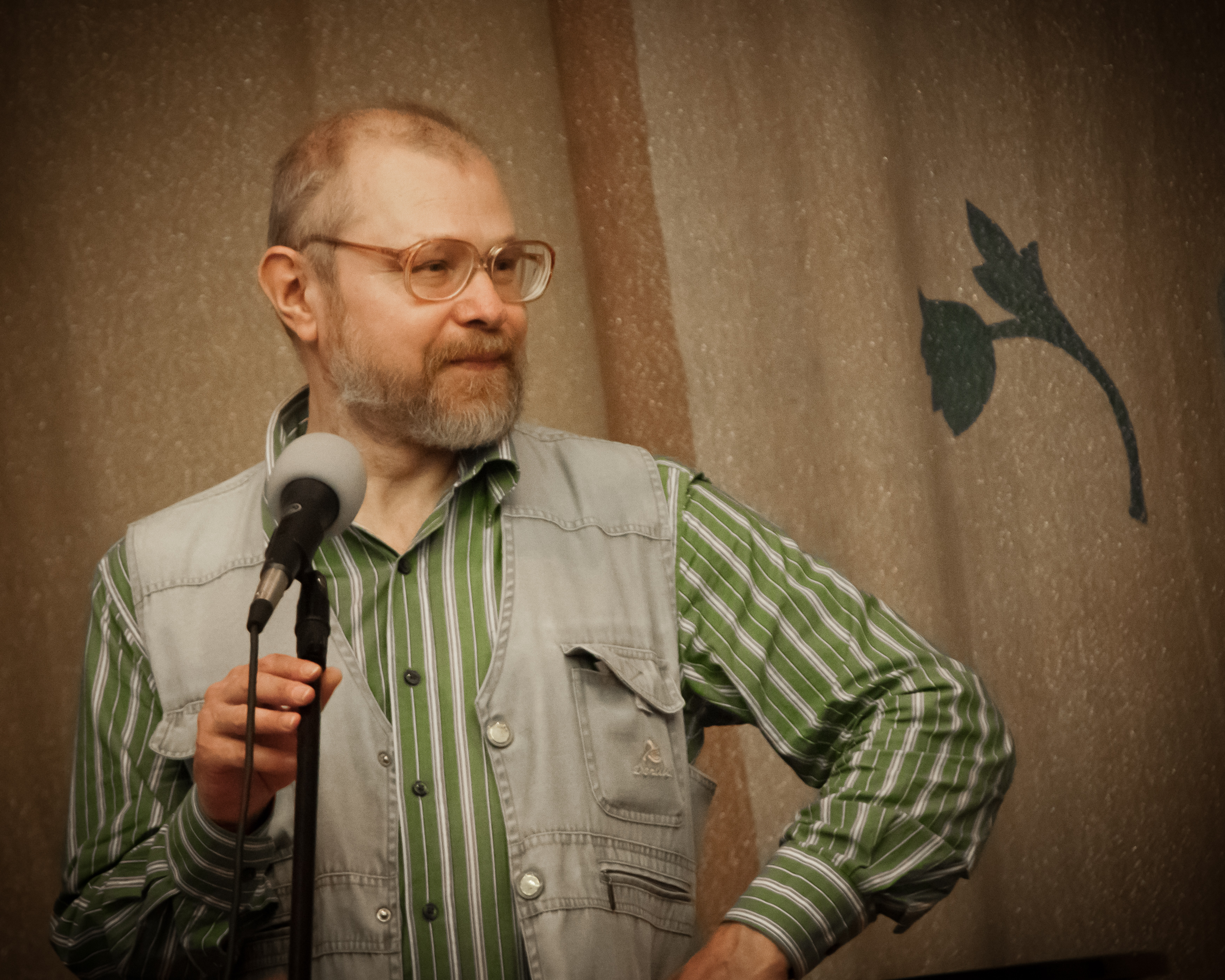 Поэт Тим Собакин (Библионочь-2012 в РГДБ)